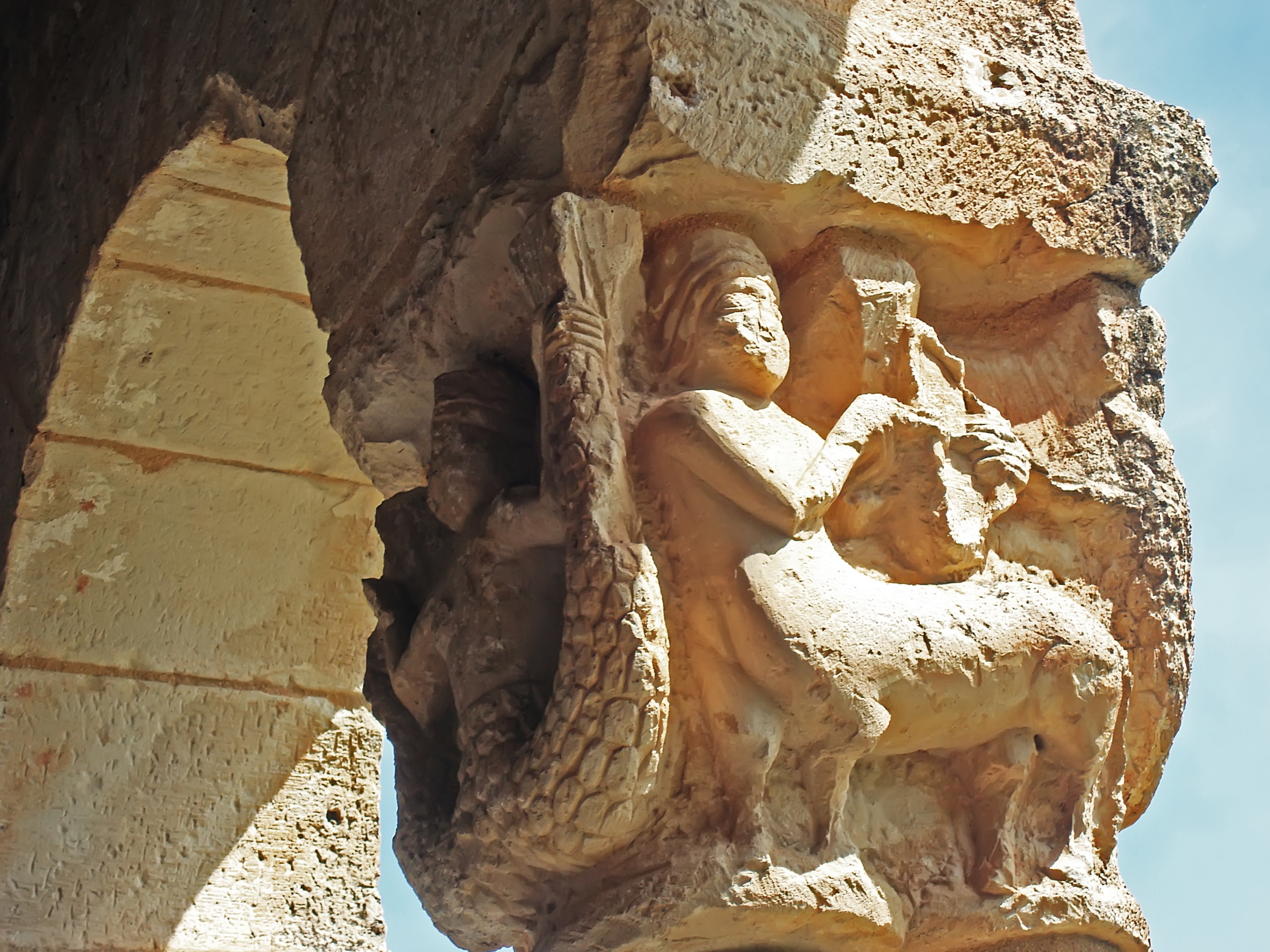 Iglesia de la Virgen de las Vegas, Requijada, Santiuste de Pedraza, provincia de Segovia, Castilla y León, España.